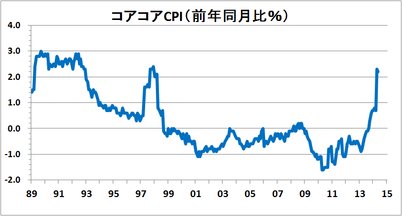 1989年以降の日本のコアコアCPI（前年同月比％）